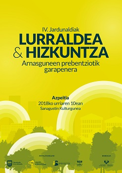 Gipuzkoako Foru Aldundiak eta UEUk antolatu zuten Lurralde eta Hizkuntza izenburudun 4. jardunaldiaren kartela